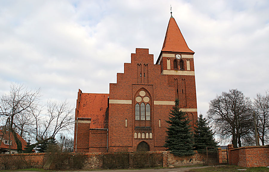 Lusowo, ul. Poznańska 2 - kościół parafialny pw. śś. Jadwigi Śląskiej i Jakuba Apostoła z XV w., 1916-1918 (zabytek nr 1176/A)